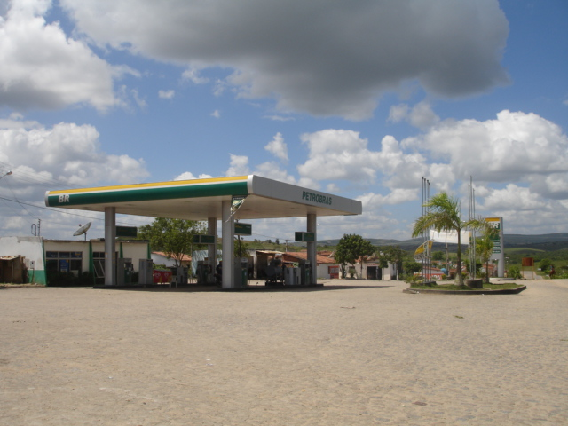 Posto da BR Distribuidora localizado na rodovia AL-487 em Traipu, Alagoas, Brasil.